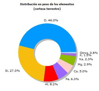 Distribucion en peso de los elementos en la corteza terrestre.